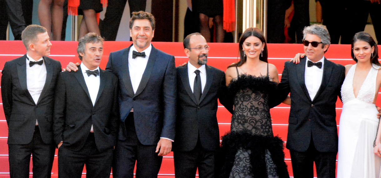 festival de Cannes.